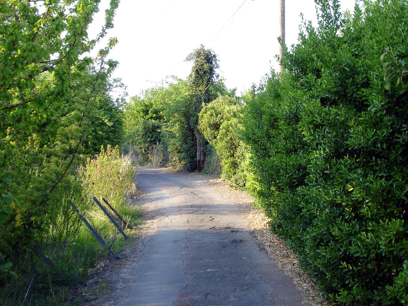 Ruelle du Lac Marchais à Deuil-la-Barre (Val-d'Oise), France Un des sentiers agrestes de la commune Avril 2007 Photo personnelle (own work) de Clicsouris